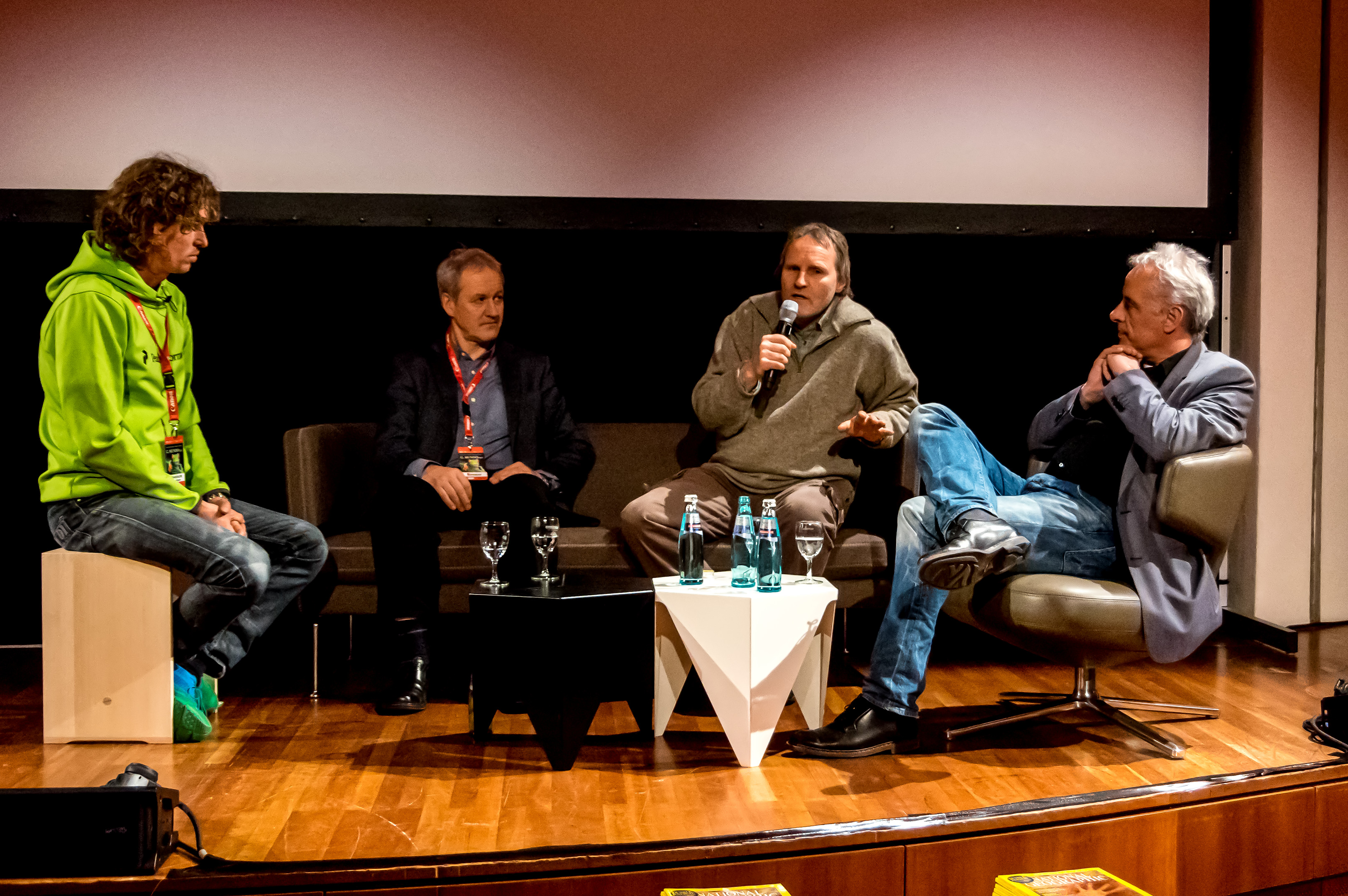 Bilder von der Mundologia 2015 Einführungsrunde der Mundologia 2015 mit dem Photographen Carsten Peter, dem stellv. Chefredakteur der National Geographic Deutschland Siebo Heinken und dem Veranstalter Tobias Hauser